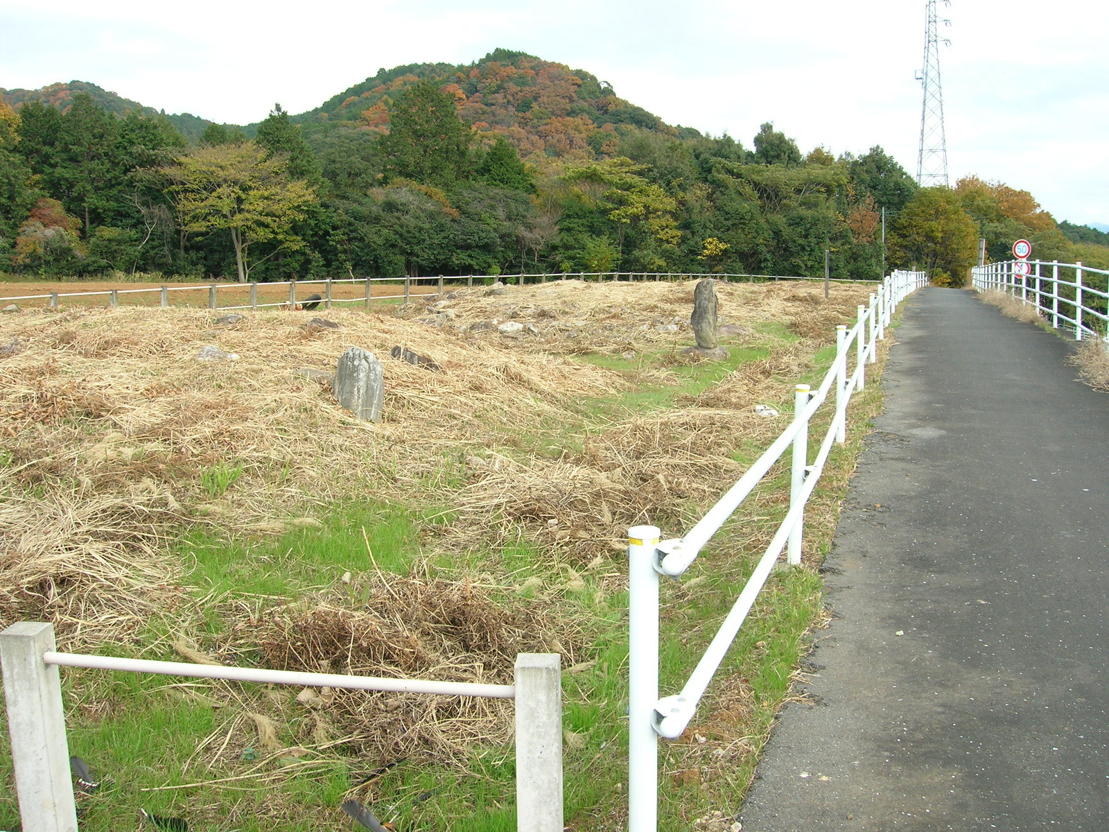 Sumiyakibira kofun-gun (Sumiyakibira kofun group), No.15, No.17, No.18, No.19 tombs. Loc: Toyokawa city, Aichi Prefecture, Japan. 炭焼平古墳群・15号墳および17〜19号墳 撮影場所 愛知県豊川市